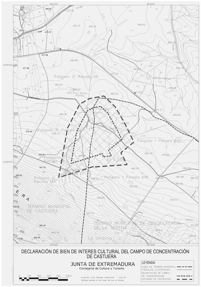 Plano del campo de concentración de Castuera, incluido en el Boletín Oficial del Estado con motivo de su incoación como Bien de Interés Cultural.